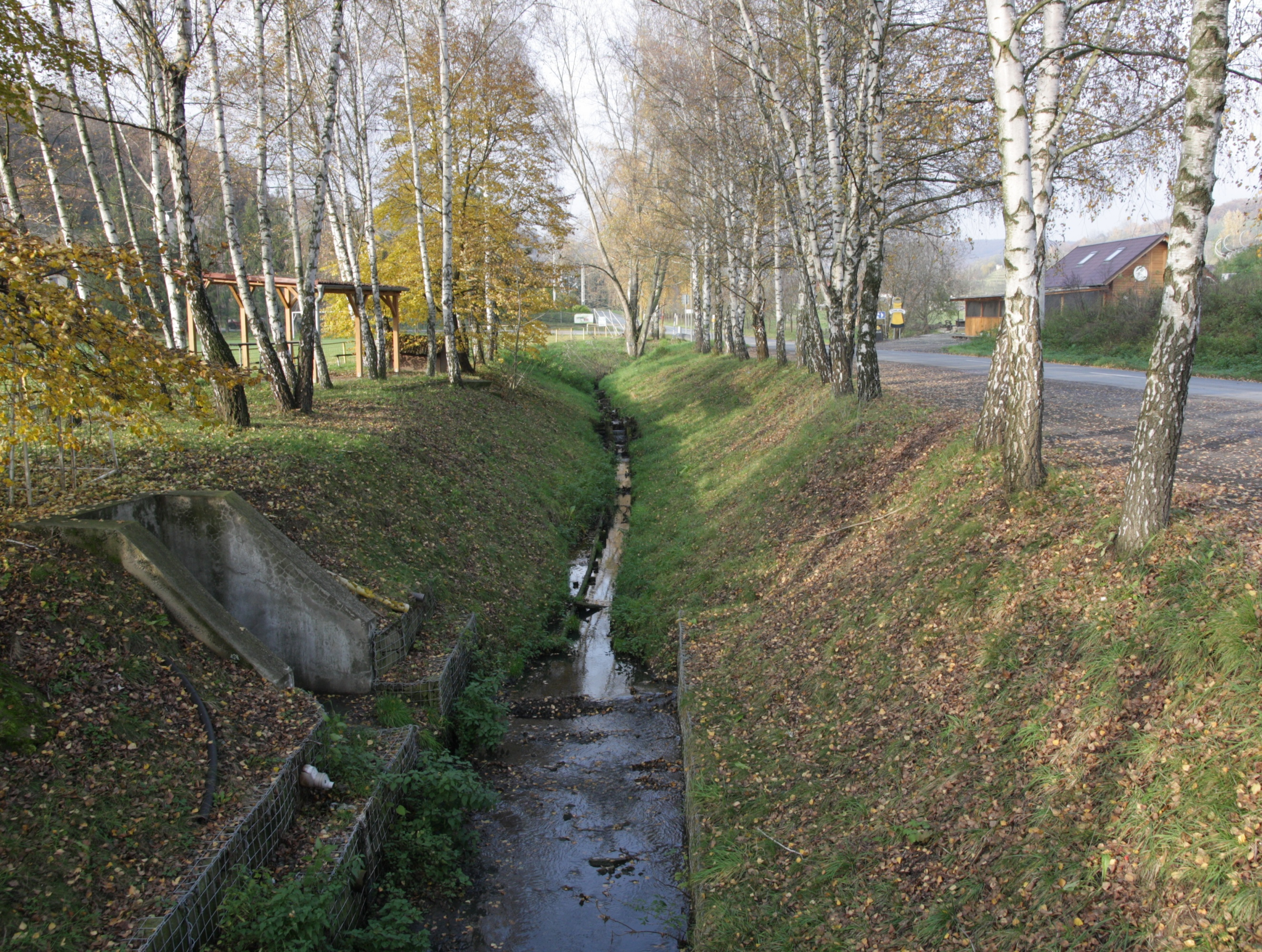 Němčičky - Němčický potok u koupaliště.